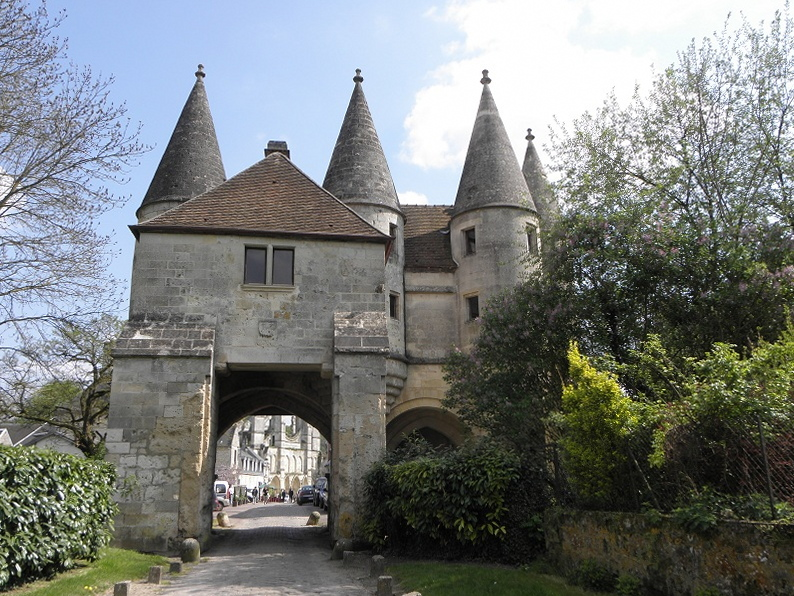 Porterie de l'abbaye de Longpont (02).